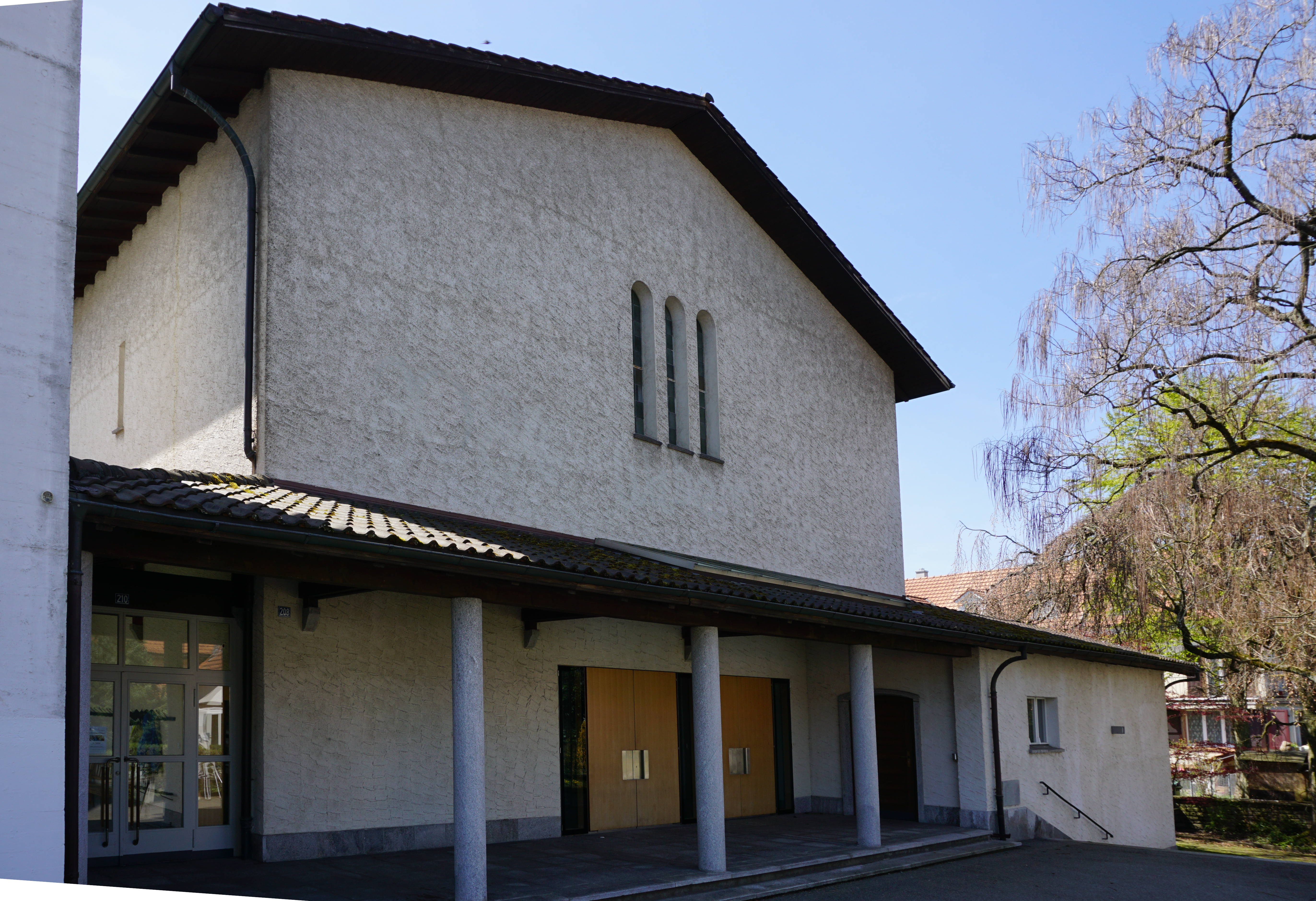 Kirche Wabern Eingang und Ostfassade